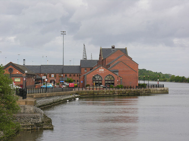 Ellesmere Port - canal frontage